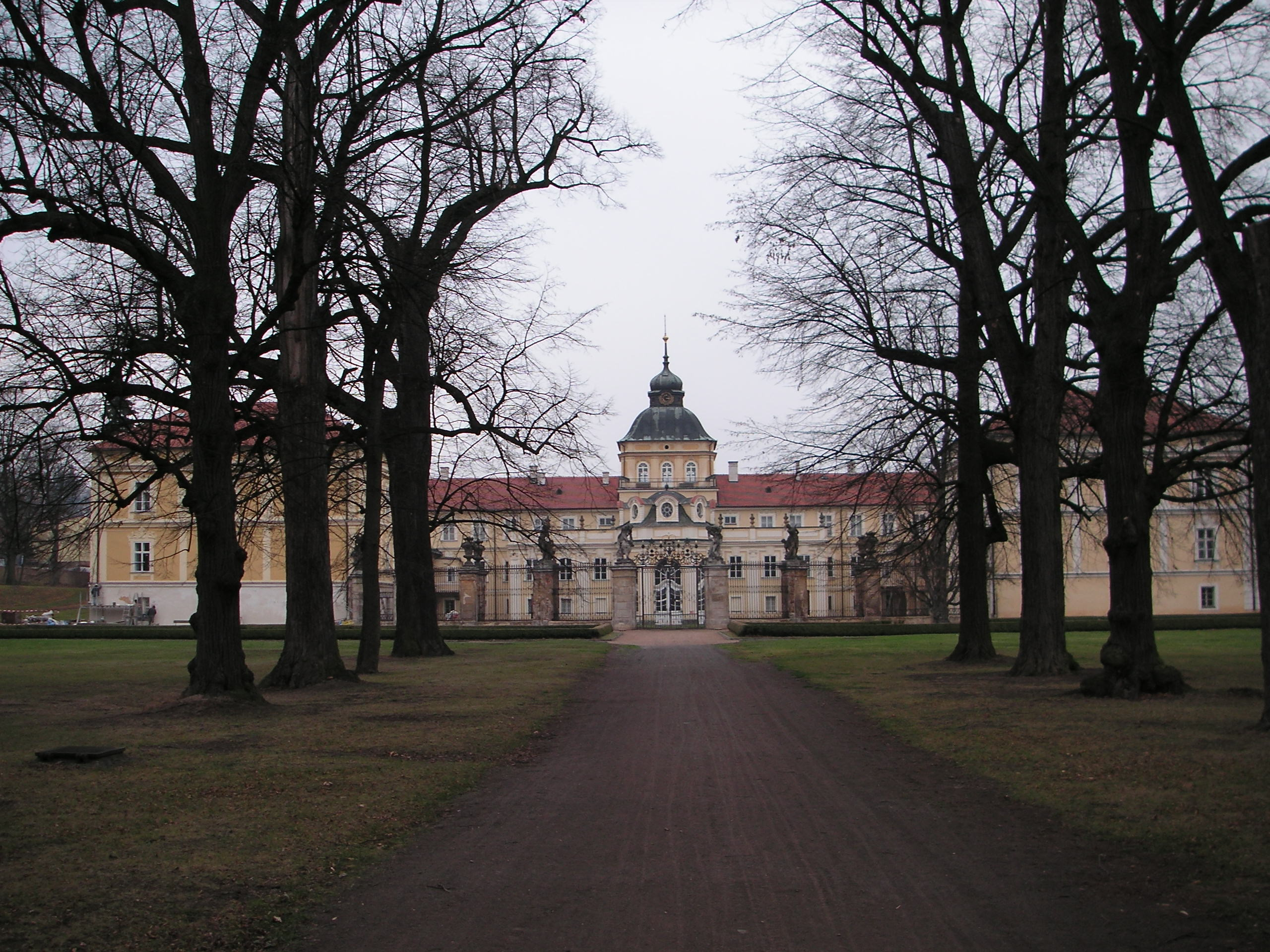 Nový zámek v Hořovicích. Pohled z parku.